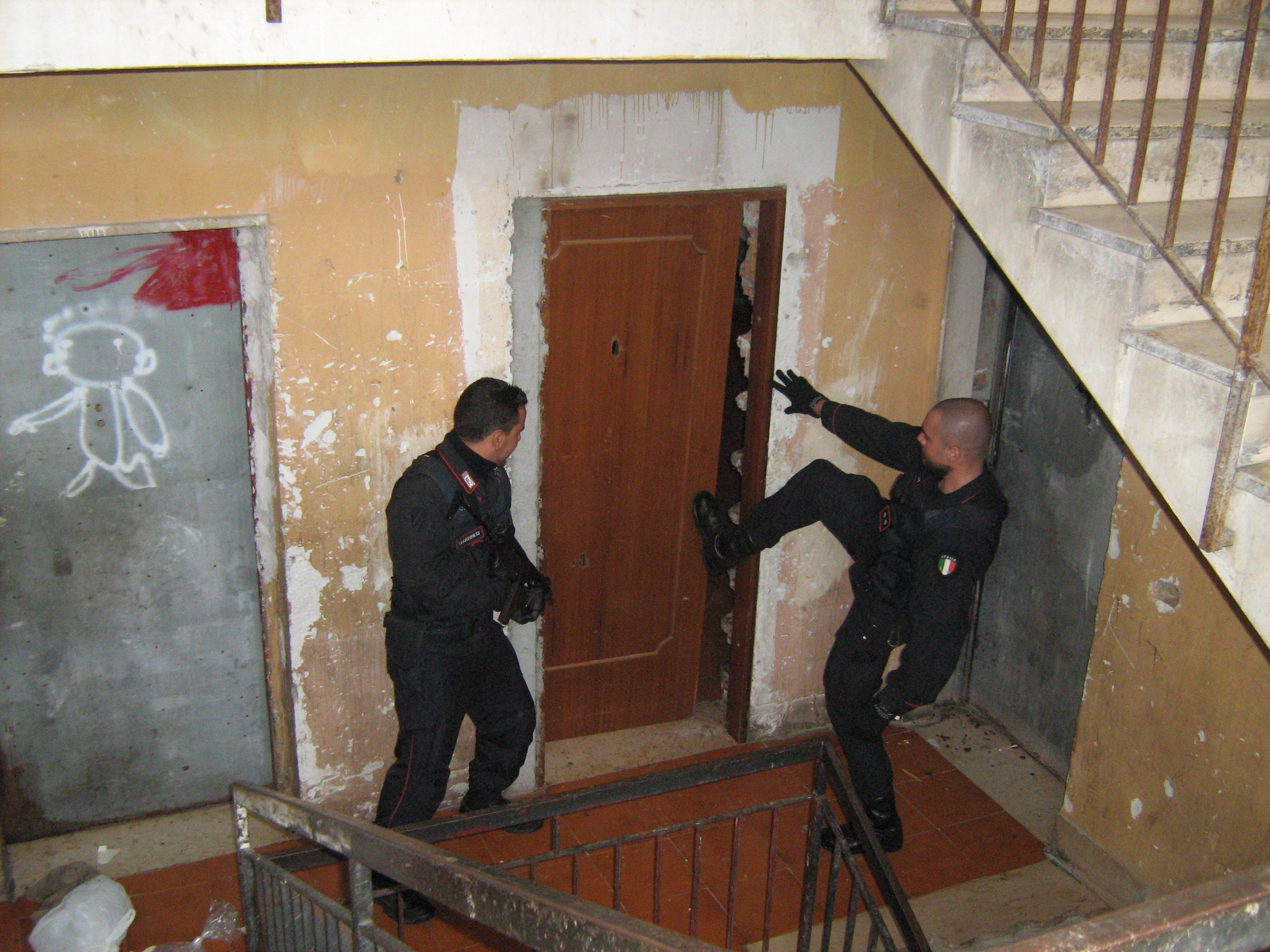 Istantanea di una irruzione in una abitazione di Gioia Tauro da parte di Militari della Compagnia Speciale di Vibo Valentia.